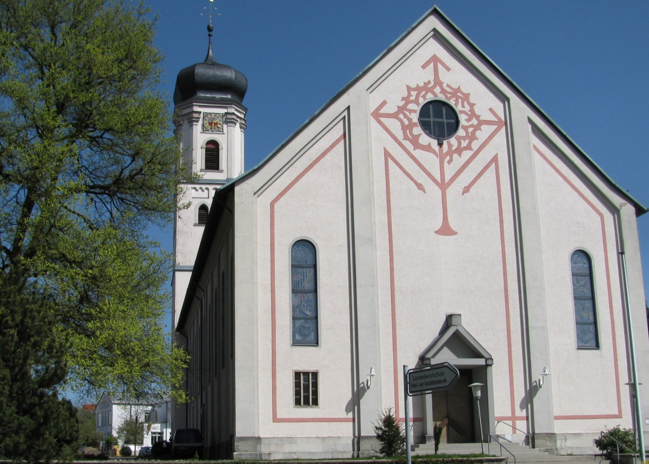 Deutschland - Baden-Württemberg - Bodenseekreis - Tettnang, Kirchstraße 24: Pfarrkirche St. Gallus